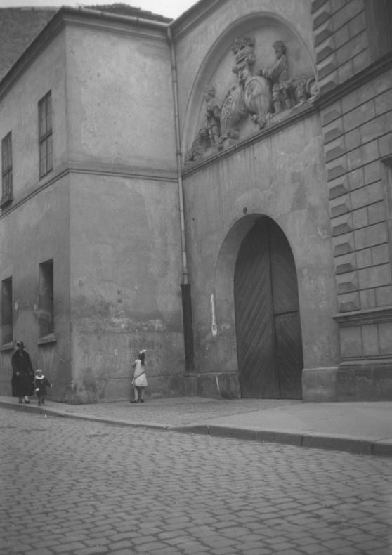 Hus vid Fürstendamm Motiv: Magdeburg Kategori: Stadsmiljö Hus vid Fürstendamm.